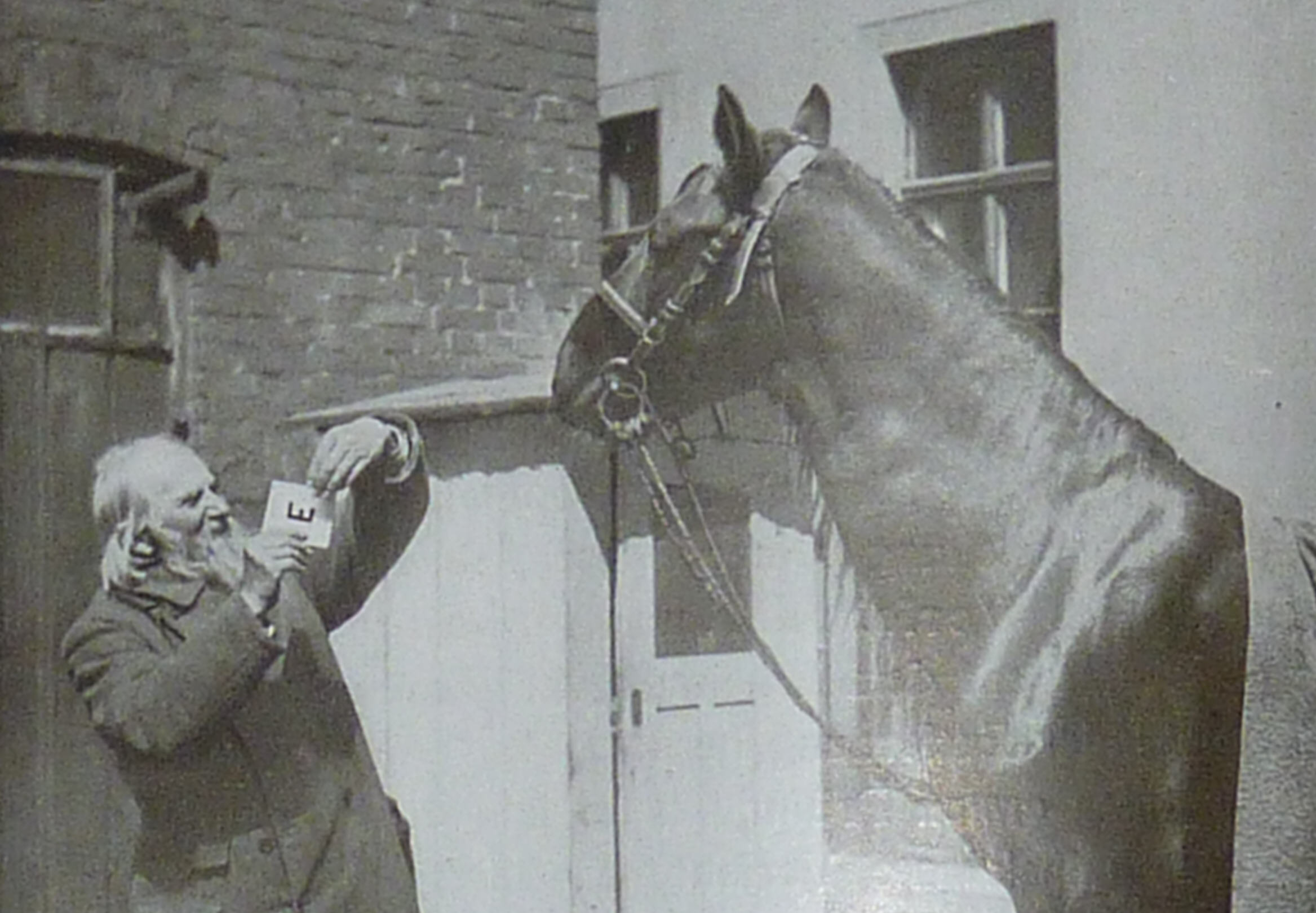 Der kluge Hans lernt, was "offen" bedeutet.